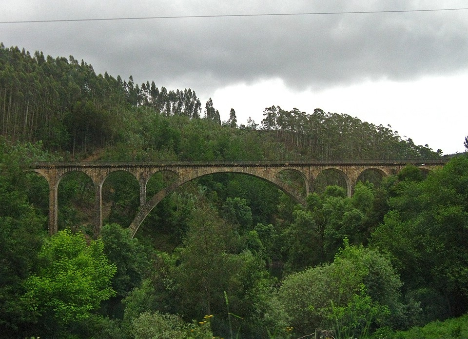 Aqui já passou o comboio. Esta ponte, situada próxima de Sever do Vouga, foi edificada no século XX sobre o Rio Vouga e fazia parte da Linha do Vale do Vouga entre Sernada do Vouga e Viseu. Em 1990 este troço foi encerrado, contudo a ponte foi preservada e é hoje uma das pontas da ecopista instalada no traçado da linha por onde já passou o Vouguinha.